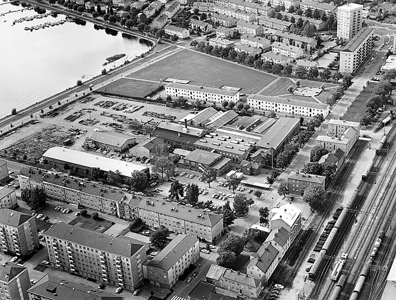 Flygfoto över Wenbergs mekaniska verkstad med omnejd